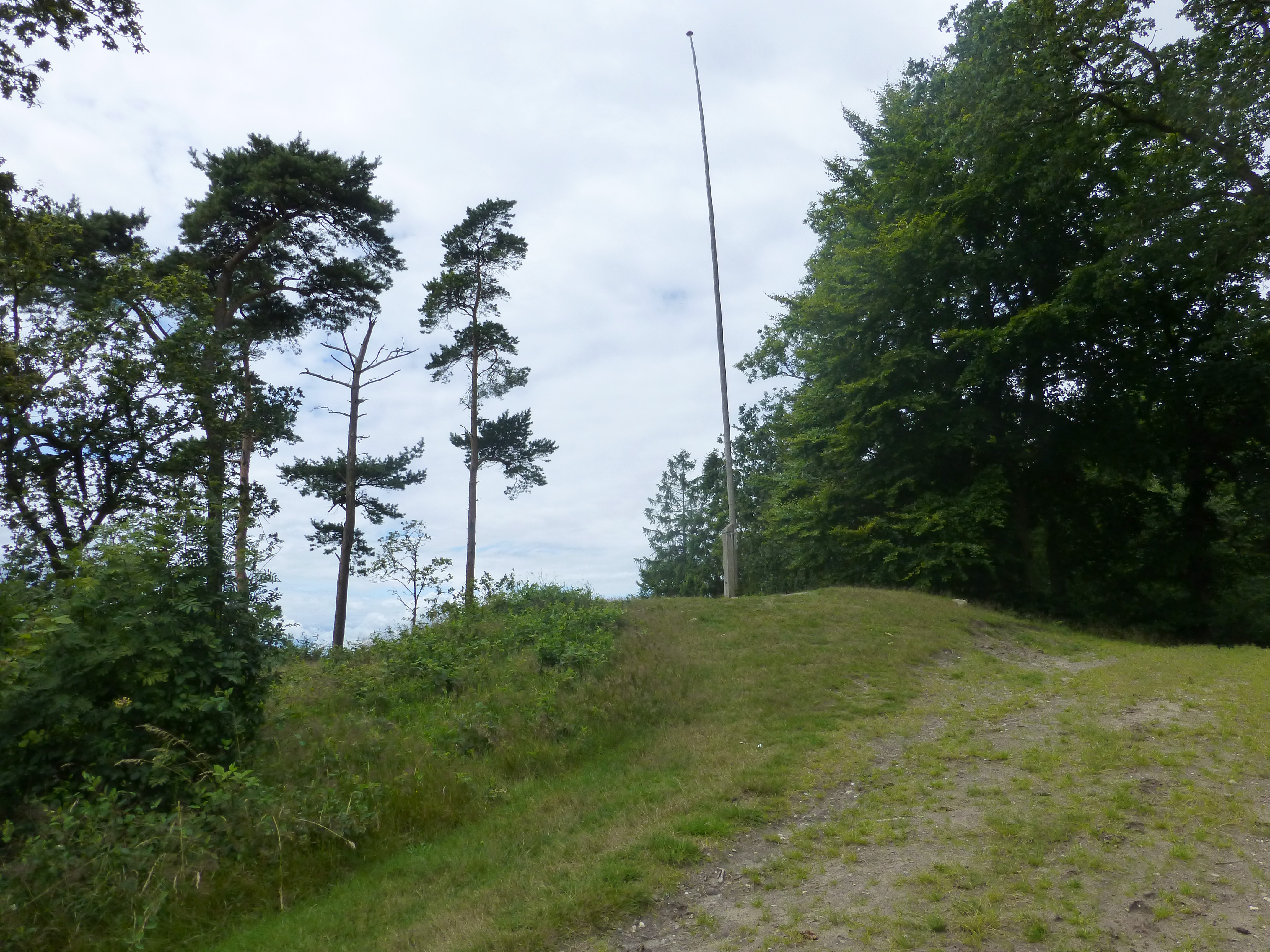 Blakshøj udsigt mod syd over Alrø